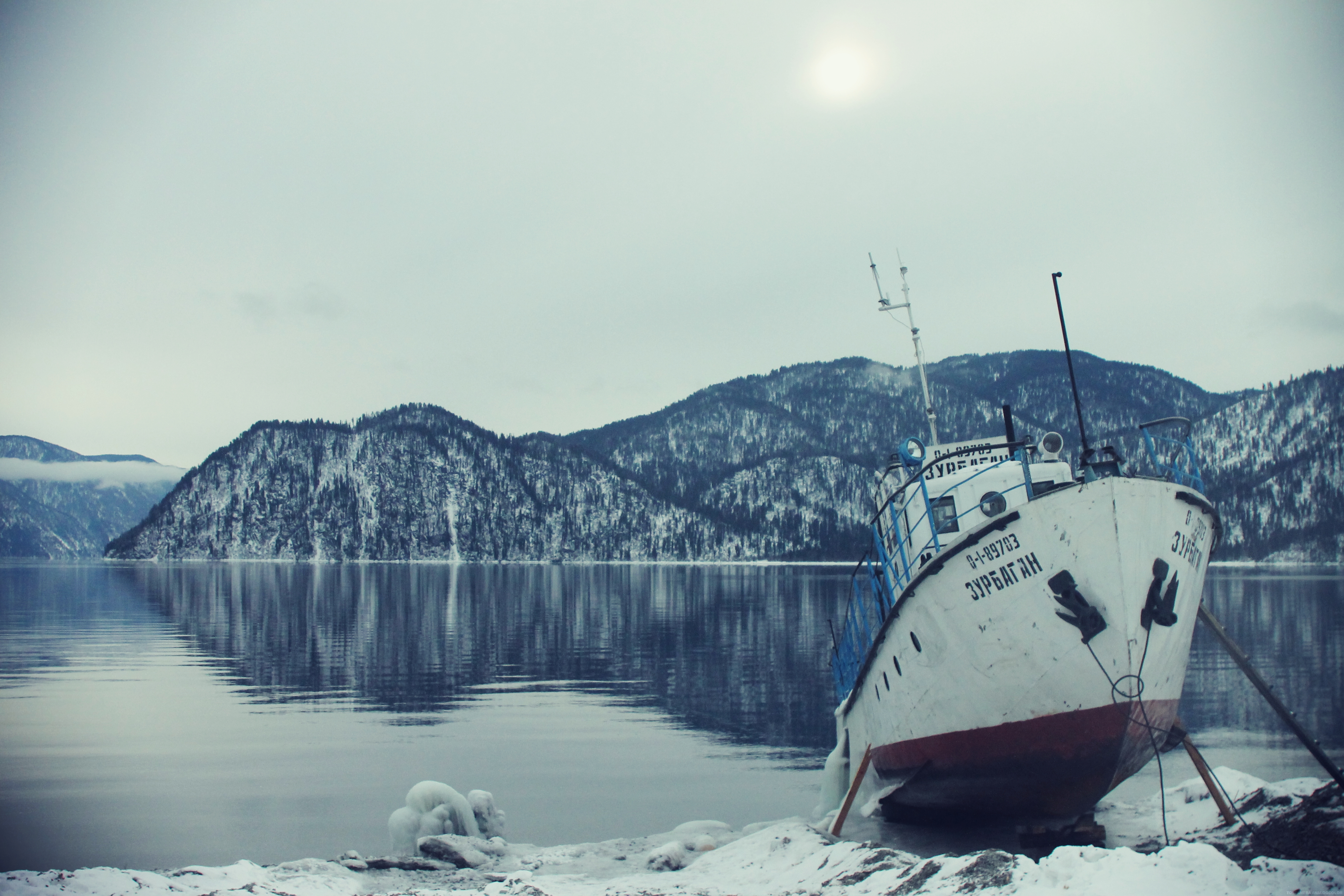 Телецкое озеро, Турочакский район This image is related to the protected area of Russia number 0410032